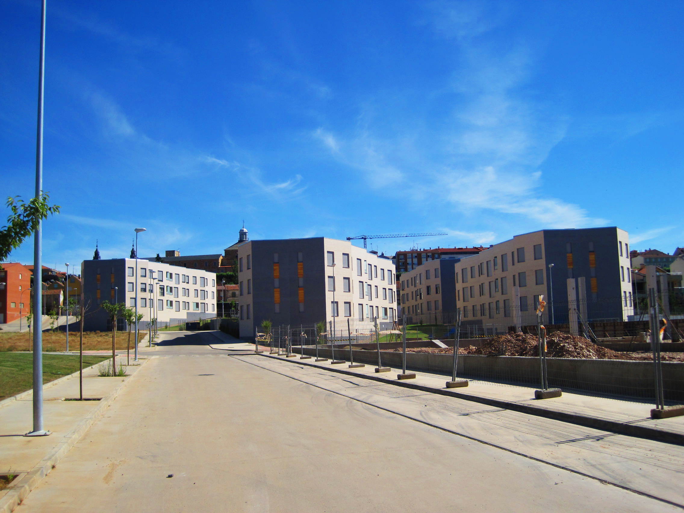 Nuevos bloques de viviendas en la zona sur de Astorga (León, España).